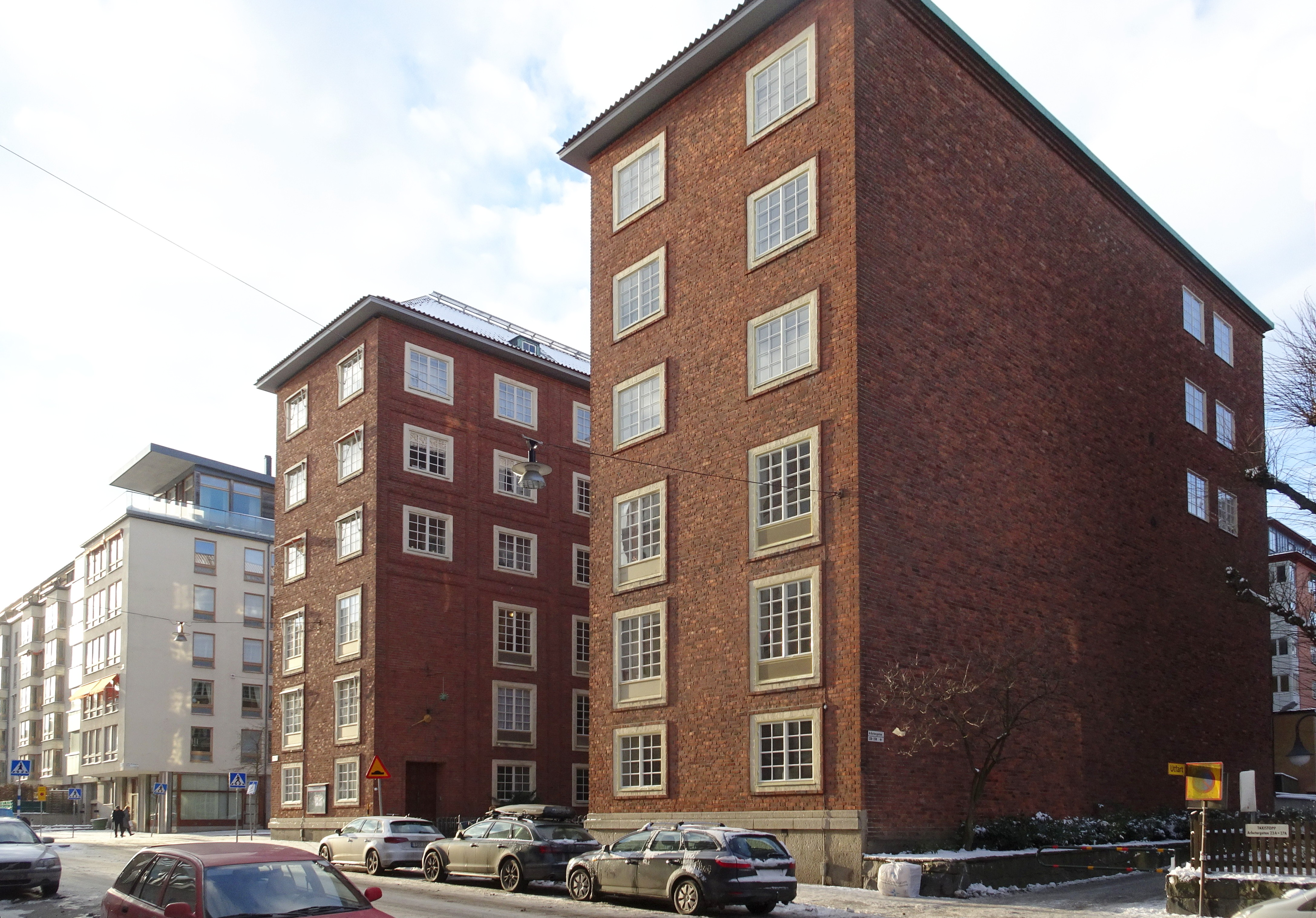 S:t Görans församlingshus, fastighet Herden 7, arkitekt Cyrillus Johansson